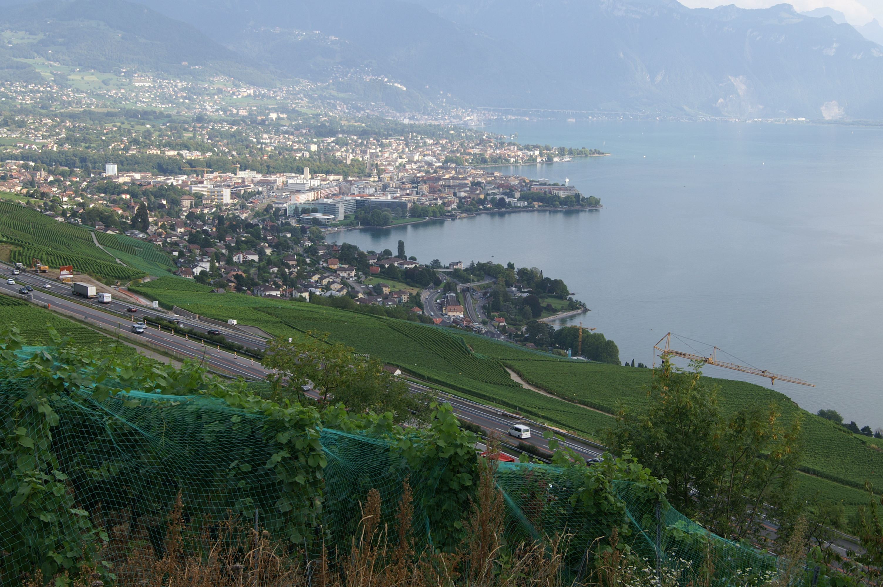 Vue de Vevey depuis Lavaux.